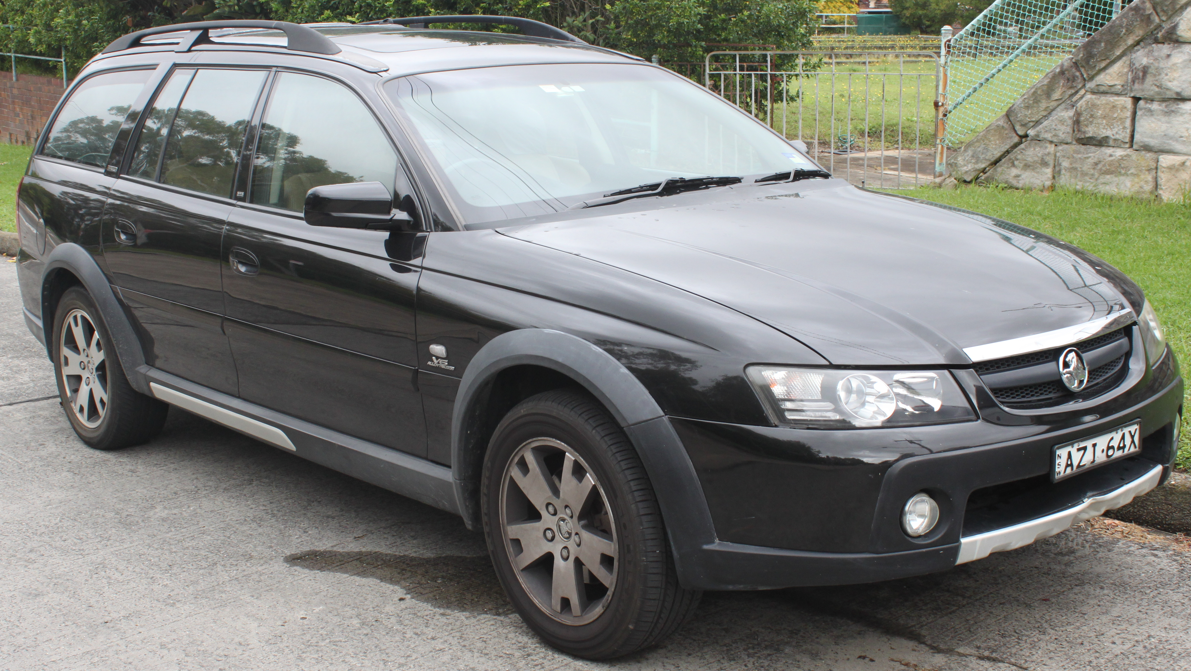 Holden Adventra VZ LX6